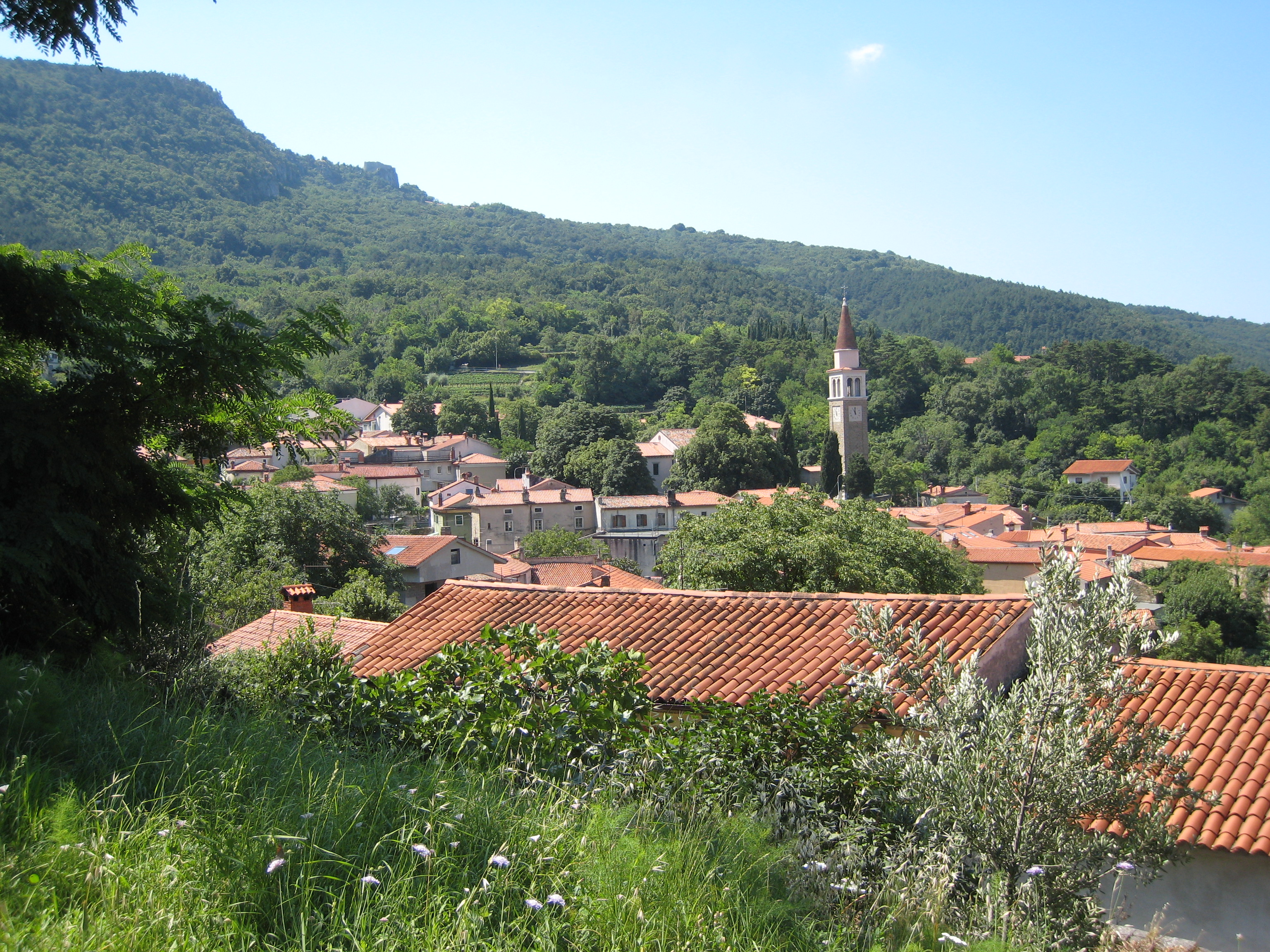 L'abitato di Dolina del comune di San Dorligo della Valle (Trieste). Luglio 2008